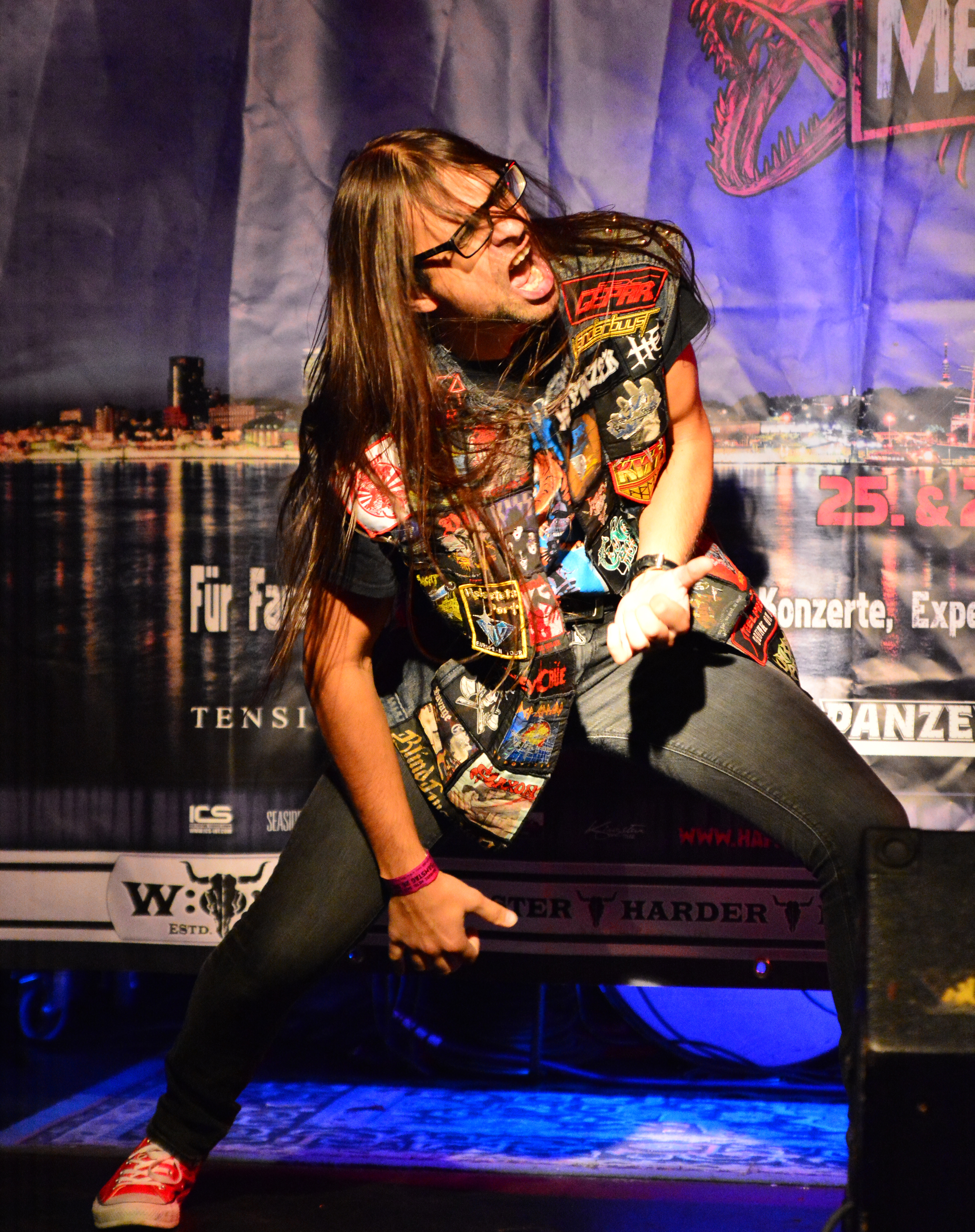 Air Guitar Contest bei den Hamburg Metal Dayz 2015